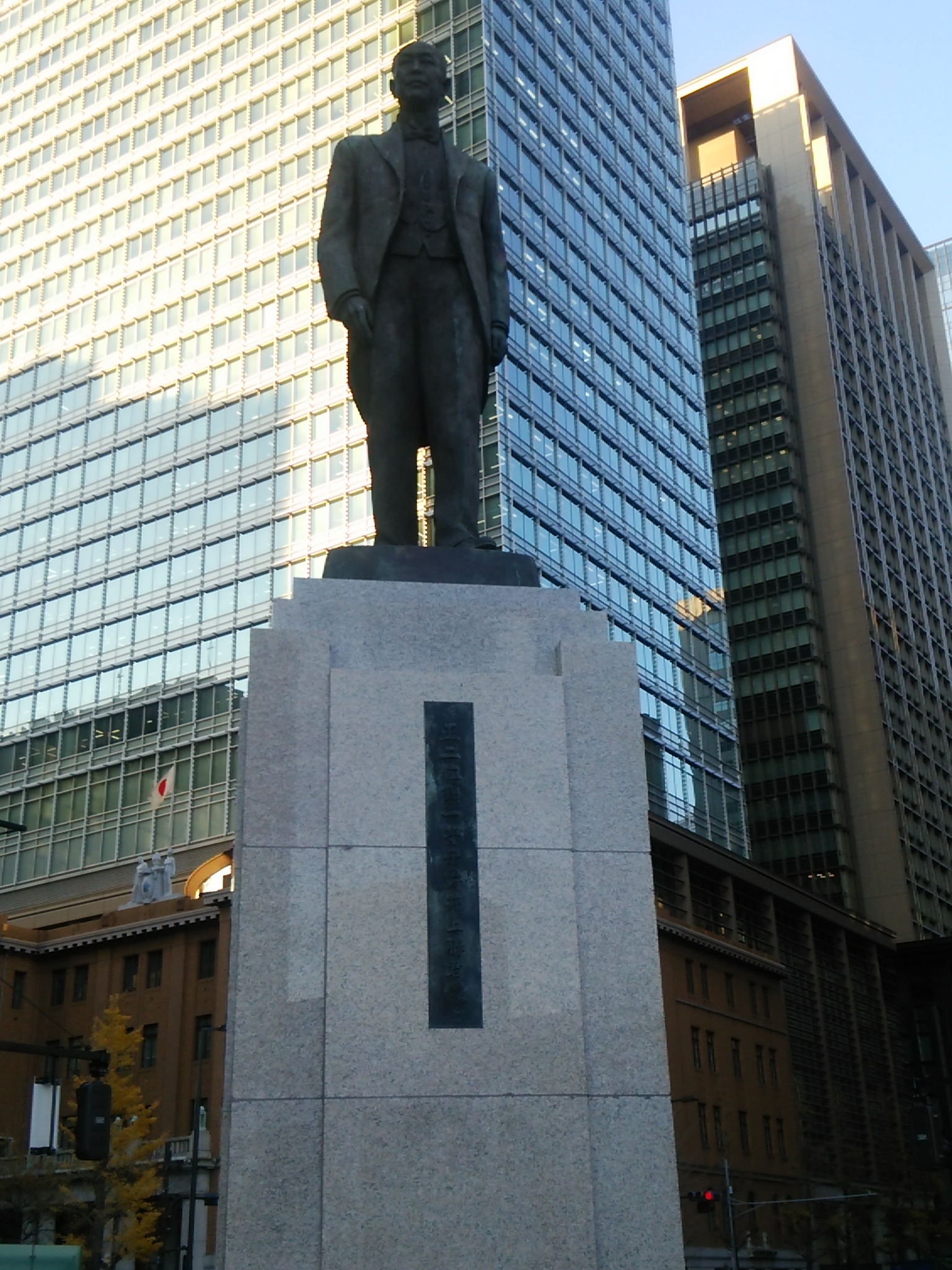 東京駅丸の内駅前広場のリニューアルに合わせて再設置された" 日本鉄道の父"井上勝の銅像。背景は日本工業倶楽部会館と三菱UFJ信託銀行本店ビル。